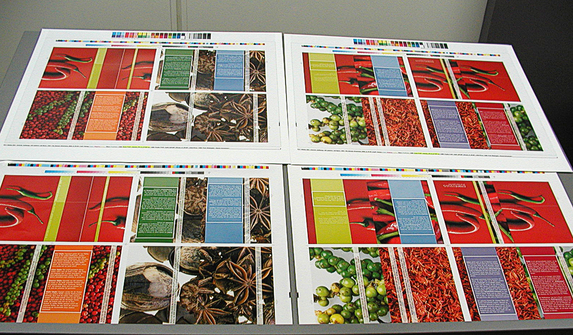 Ziel des Colormanagement ist die identische Farbwiedergabe zwischen Druck und Proof